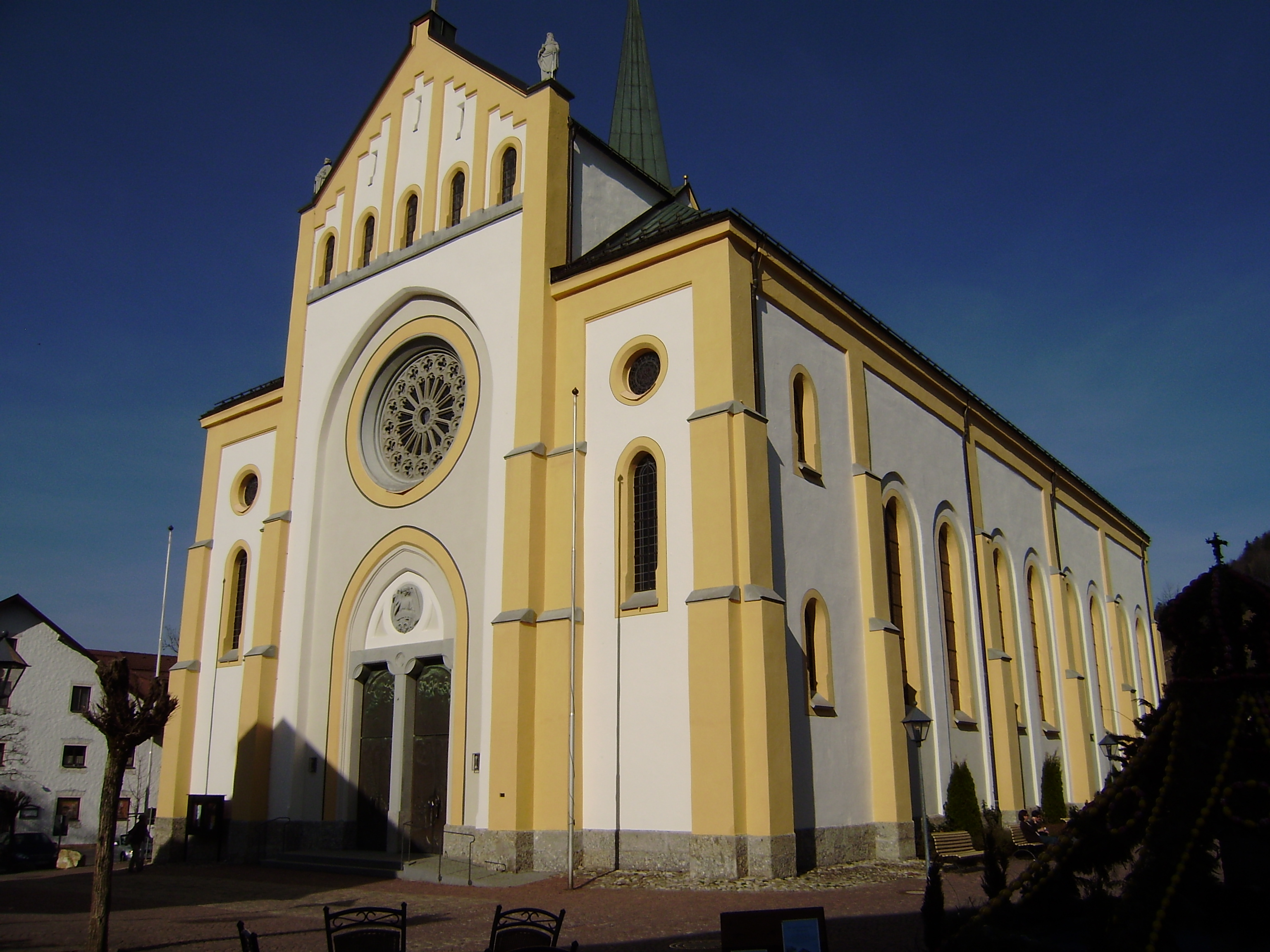 St Peter und Paul, St Peter und Paul, Oberstaufen, Hauptportalseite von SW